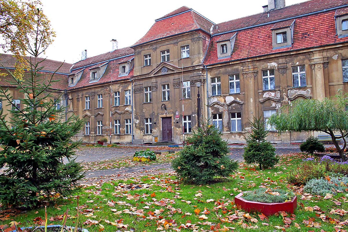 Dom dziecka w pałacu w Sławie